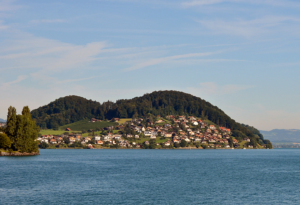 Faulensee am Thunersee